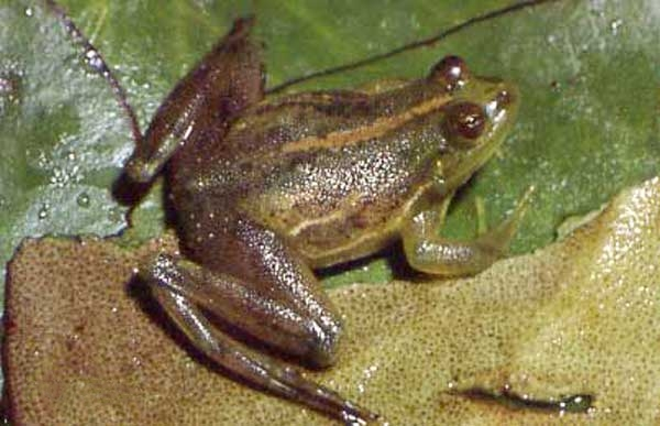 Lysapsus limellum